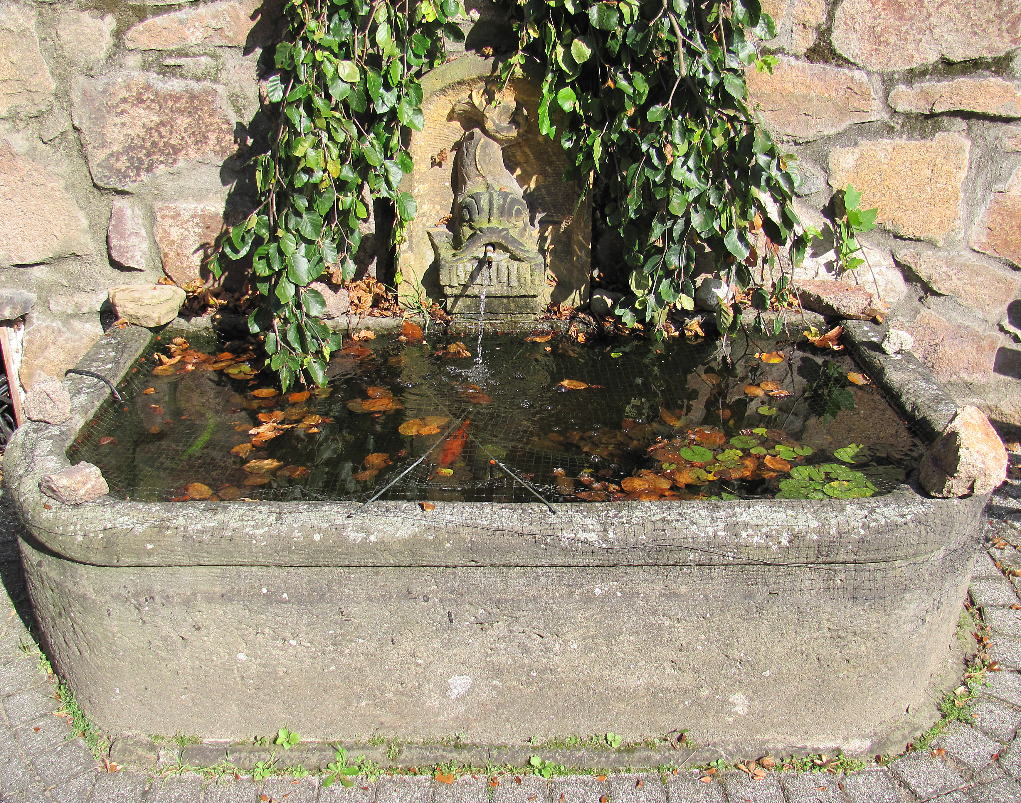 Radebeul, Wassertrog mit Delphin